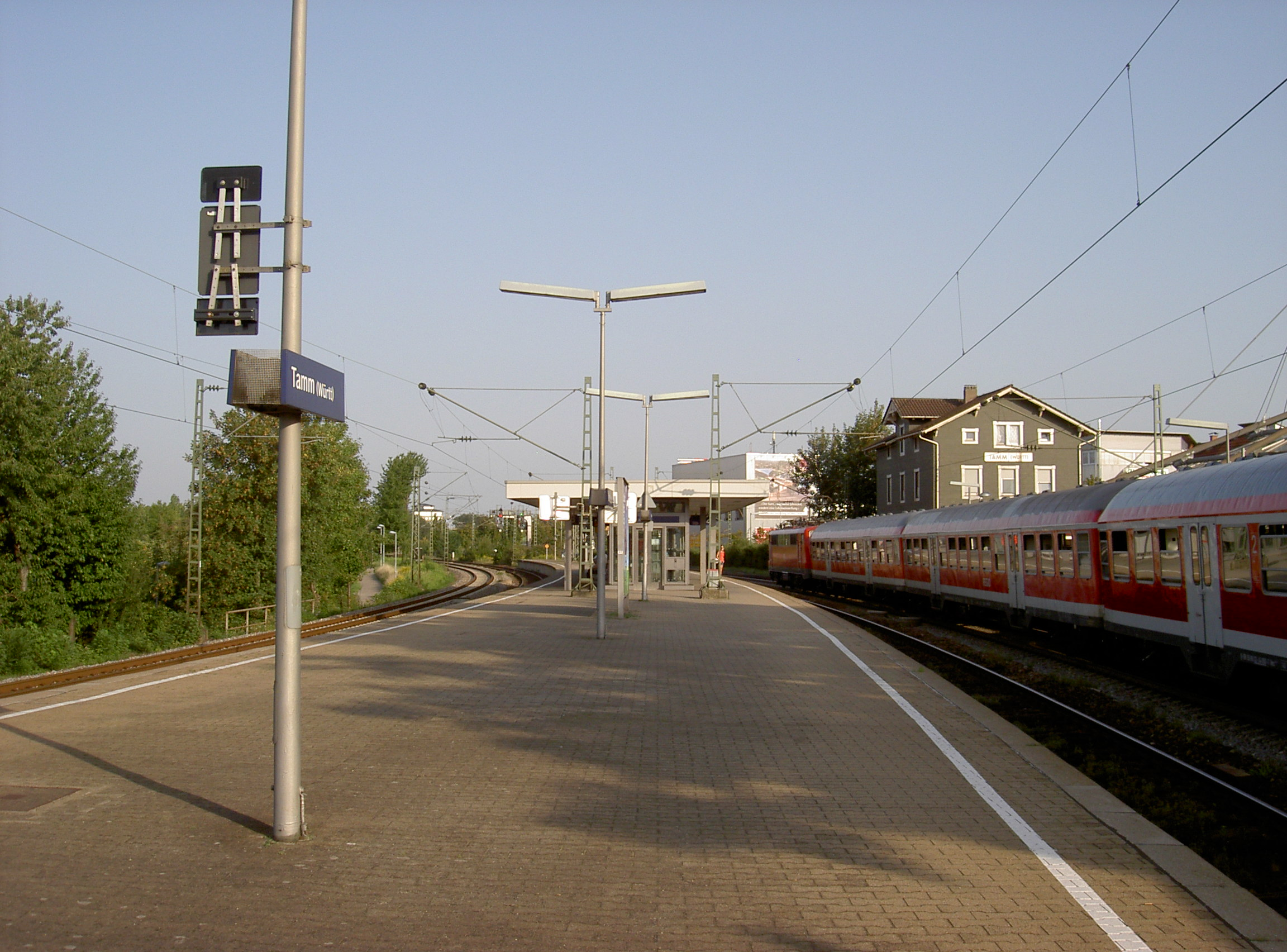 Bahnhof Tamm